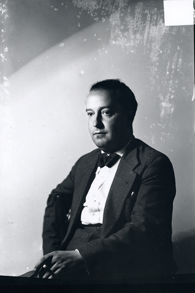 Emilio Camps Cazorla.